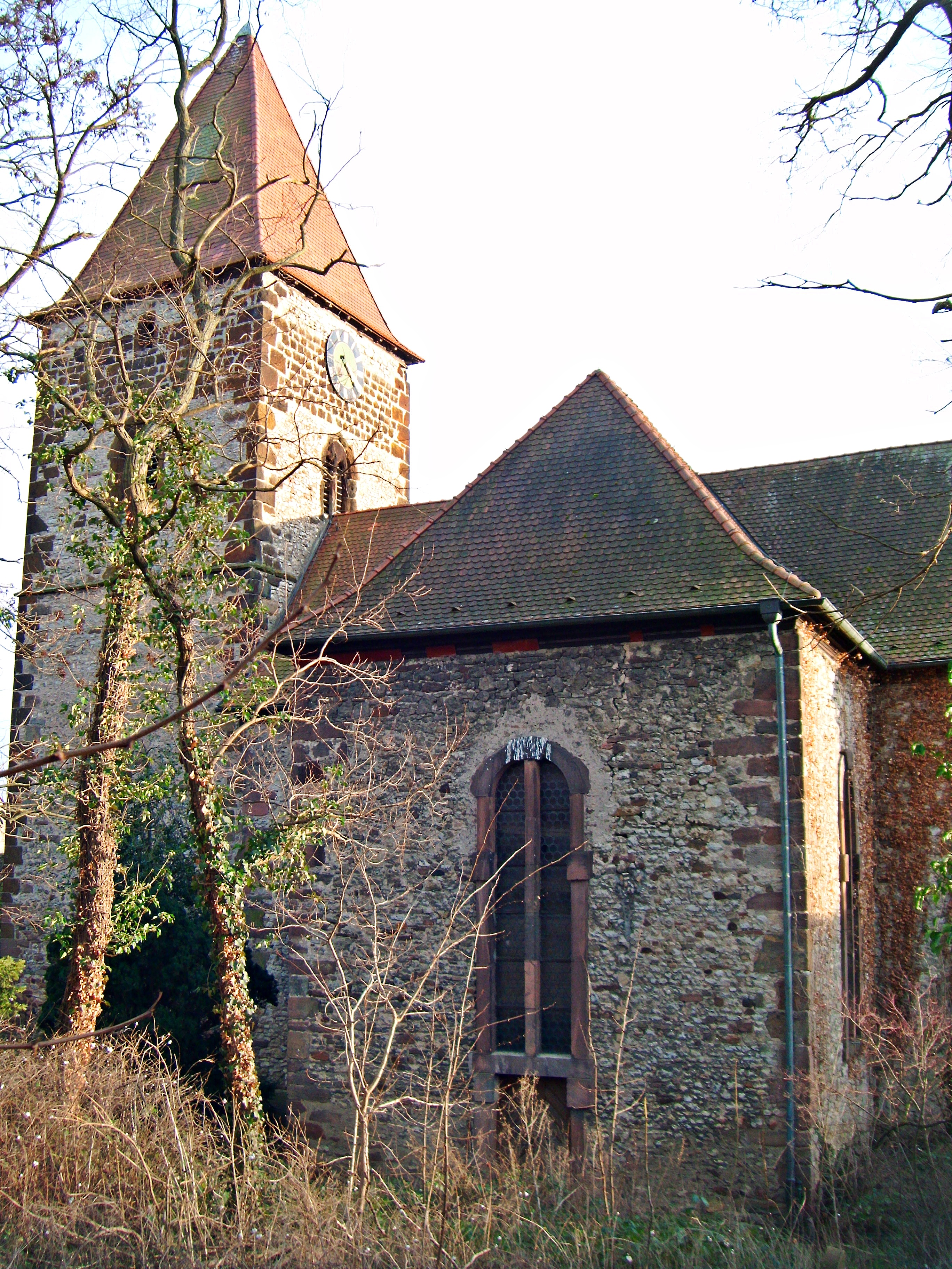 Protestantische Kirche, Obrigheim Pfalz, Ortsteil Mühlheim